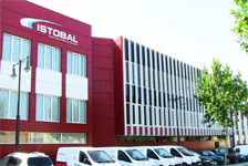 Imagen de las sede de ISTOBAL en L'Alcúdia (Valencia)